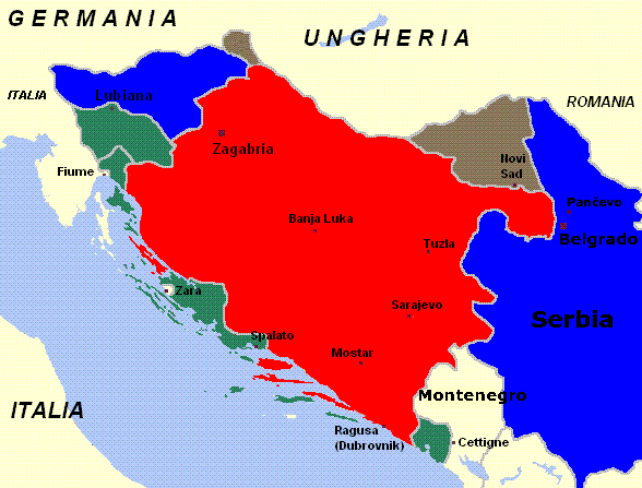 Mappa dello smembramento della Iugoslavia nel 1941. Il verde indica le aree appartenenti all'Italia (il "Governatorato di Dalmazia" ed a nord la "Provincia di Lubiana"), mentre il rosso alla Croazia di Pavelic. Il blu le aree occupate dalla Germania ed il marrone dall'Ungheria